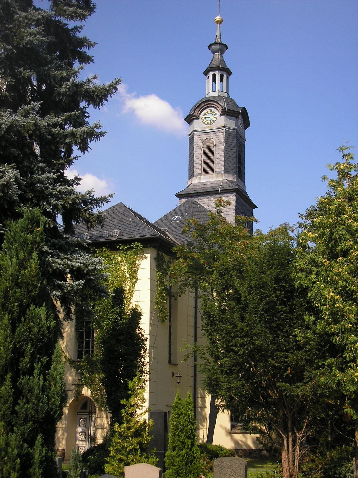 Die Kreuzkirche in Zeulenroda (Thüringen).